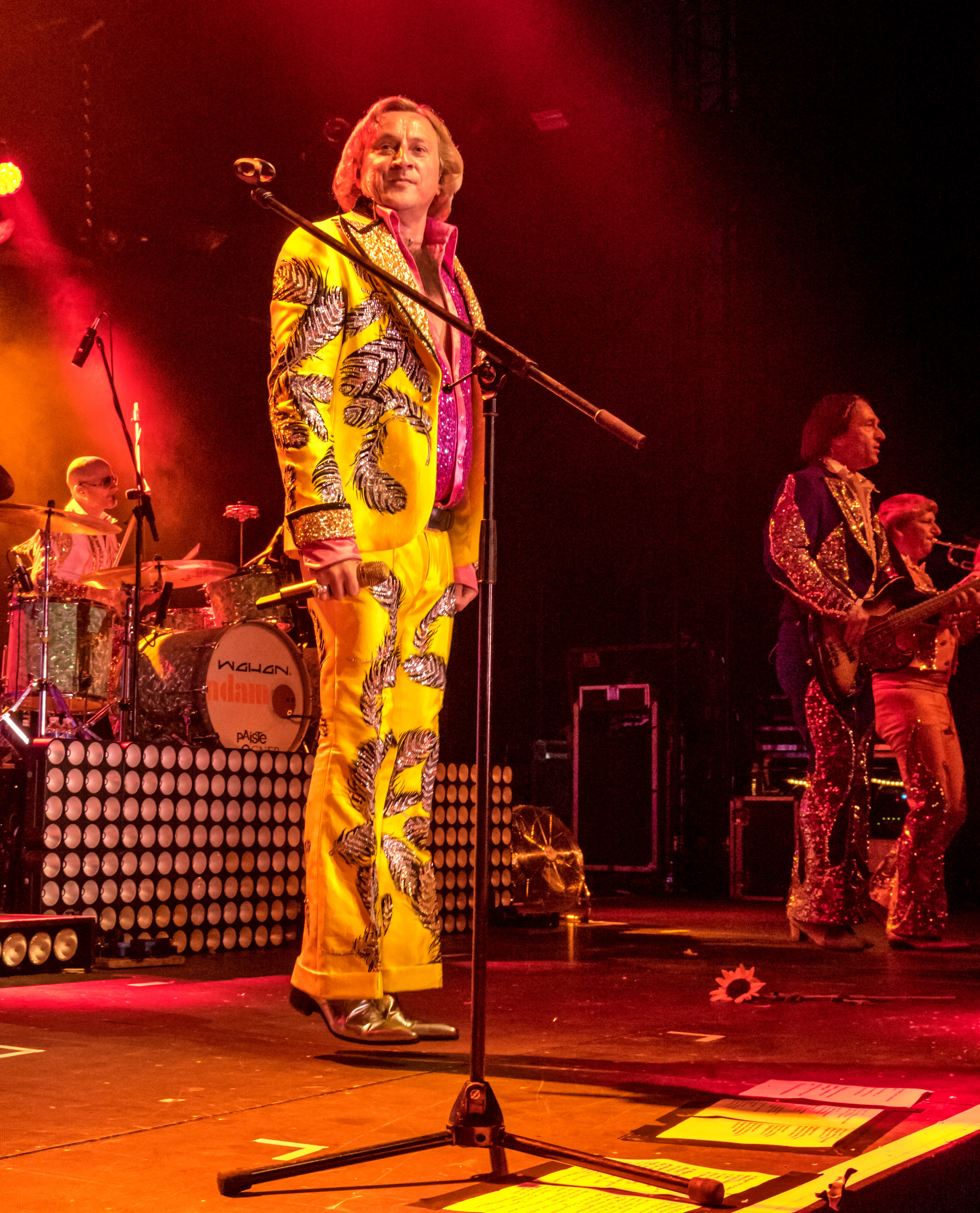 Bilder vom Zelt Musik Festival 2017 in Freiburg im Breisgau Das erste von zwei Konzerten von DTK auf dem ZMF in Freiburg (07.07.2017 und 14.07. 2017) beide ausverkauft